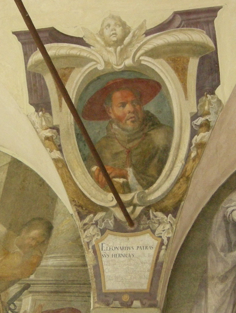 Chiostro di ognissanti, personalità francescane 13 Leonardo Patrasso